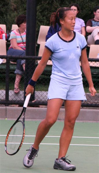 Meilen TuMeilen Tu